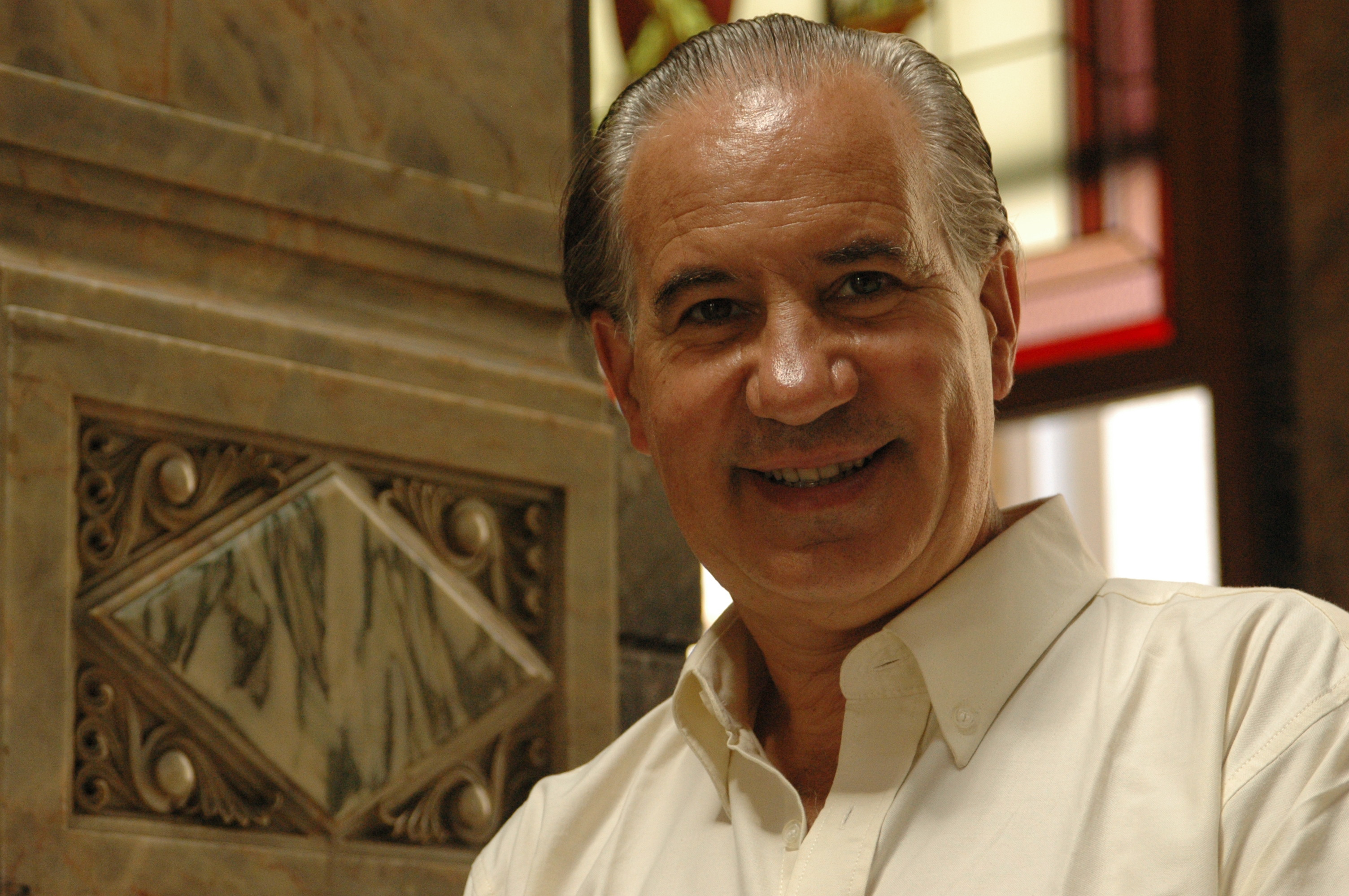 Ingeniero, político y escritor uruguayo